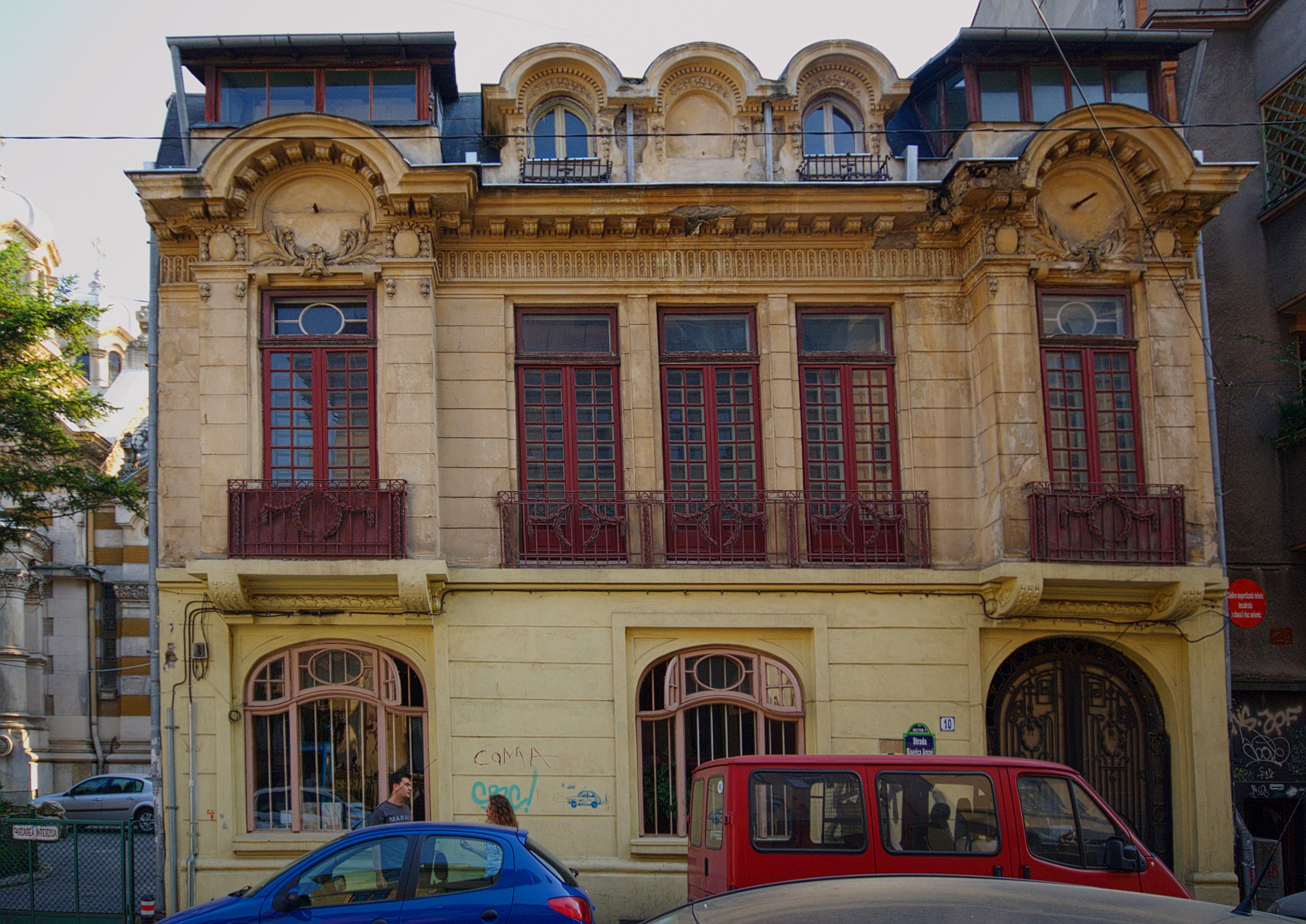 Casă, Biserica Amzei 10